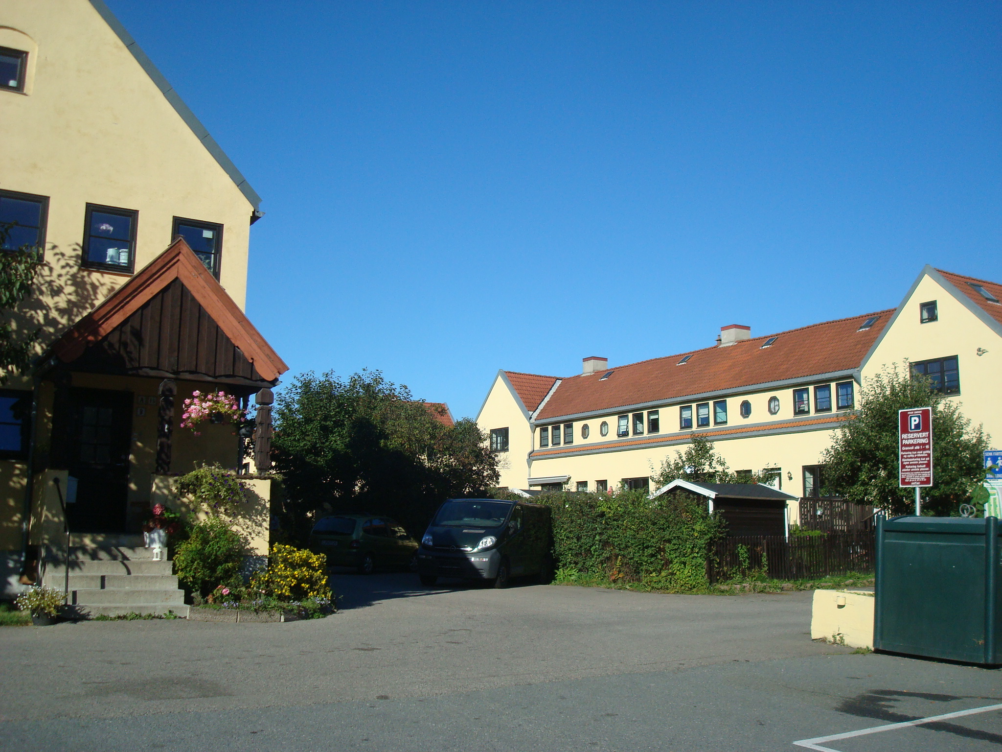 Fyrstikkarbeiderboligene i Grønvoll allé i Oslo, Grønvold Hageby.